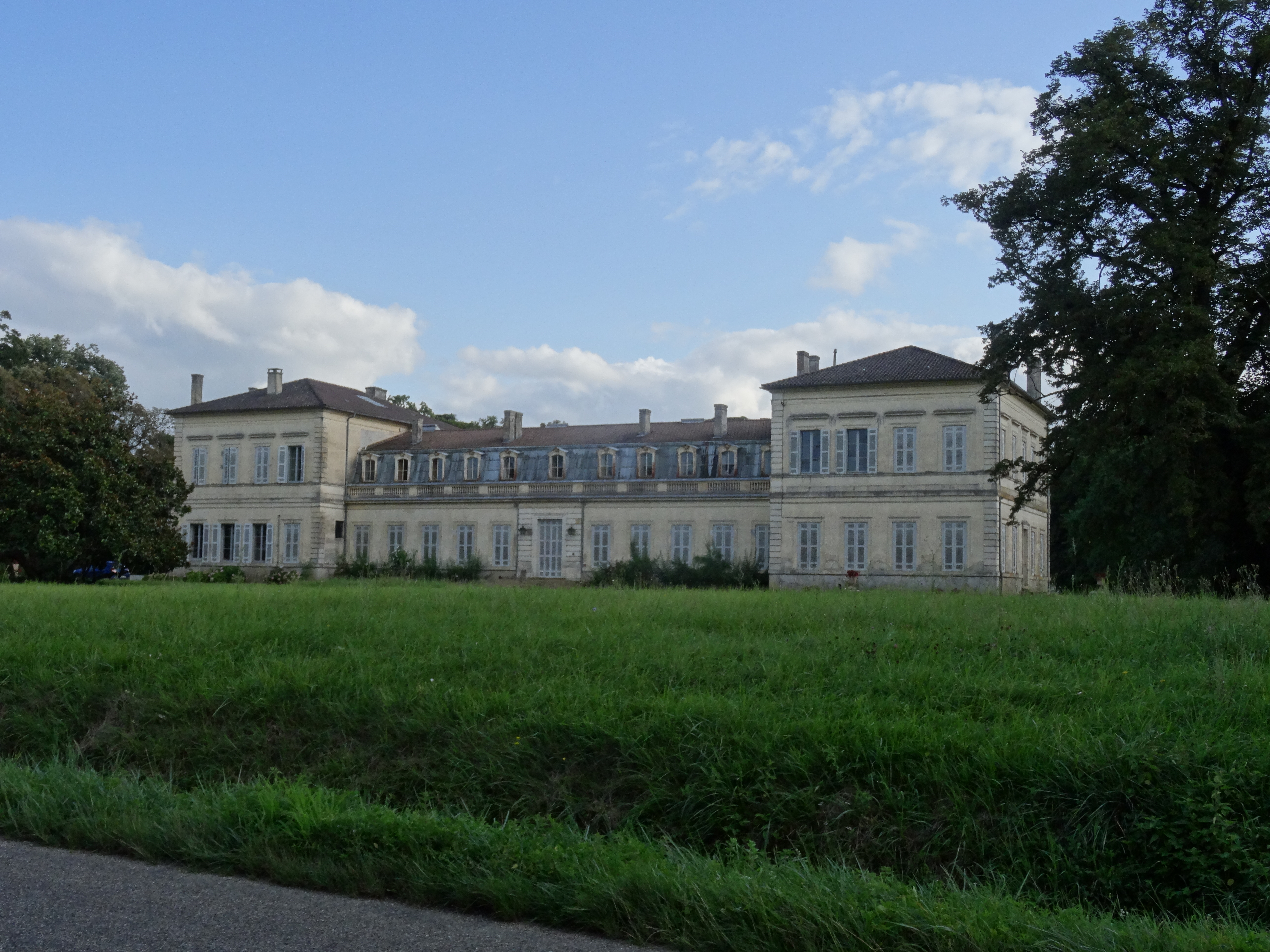 Sauveterre-Saint-Denis (47) : le Château de Saint-Denis, façade Nord, depuis la RD 308